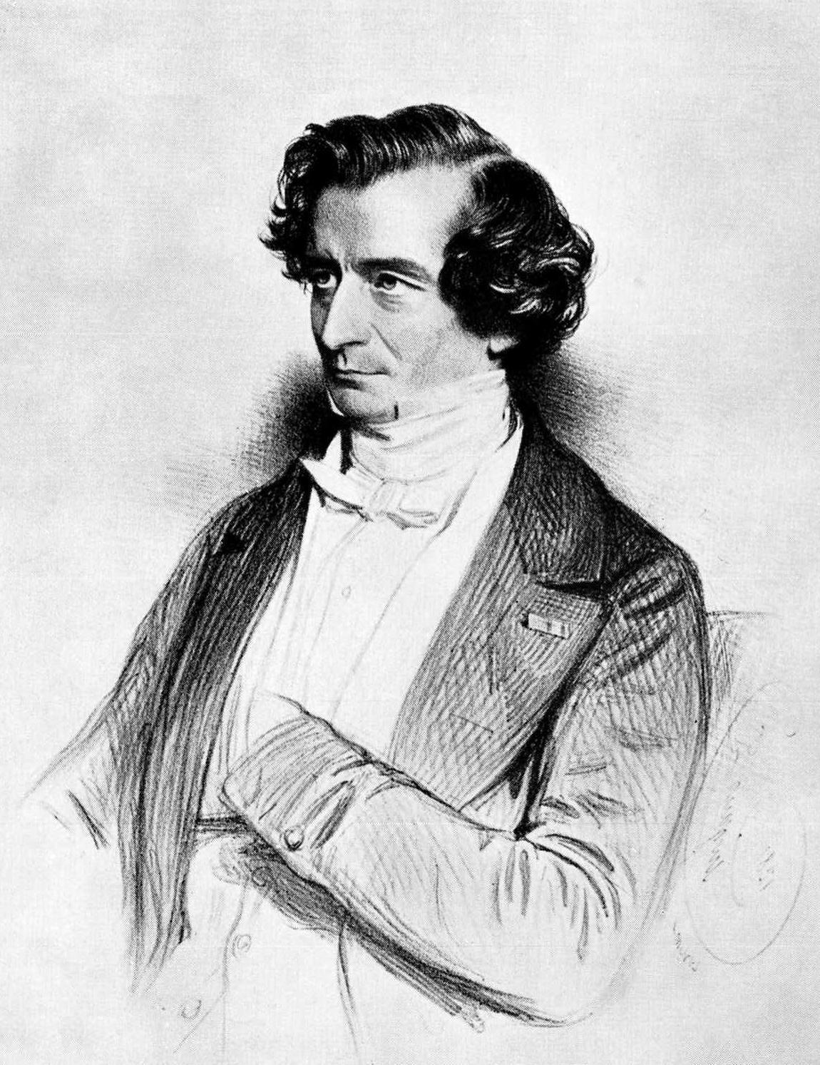 Hector Berlioz gravure anonyme